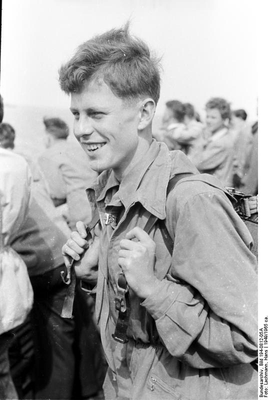 CVJM Ferienlager "Waterdelle" des Evangelischen Jungmännerwerkes Deutschlands